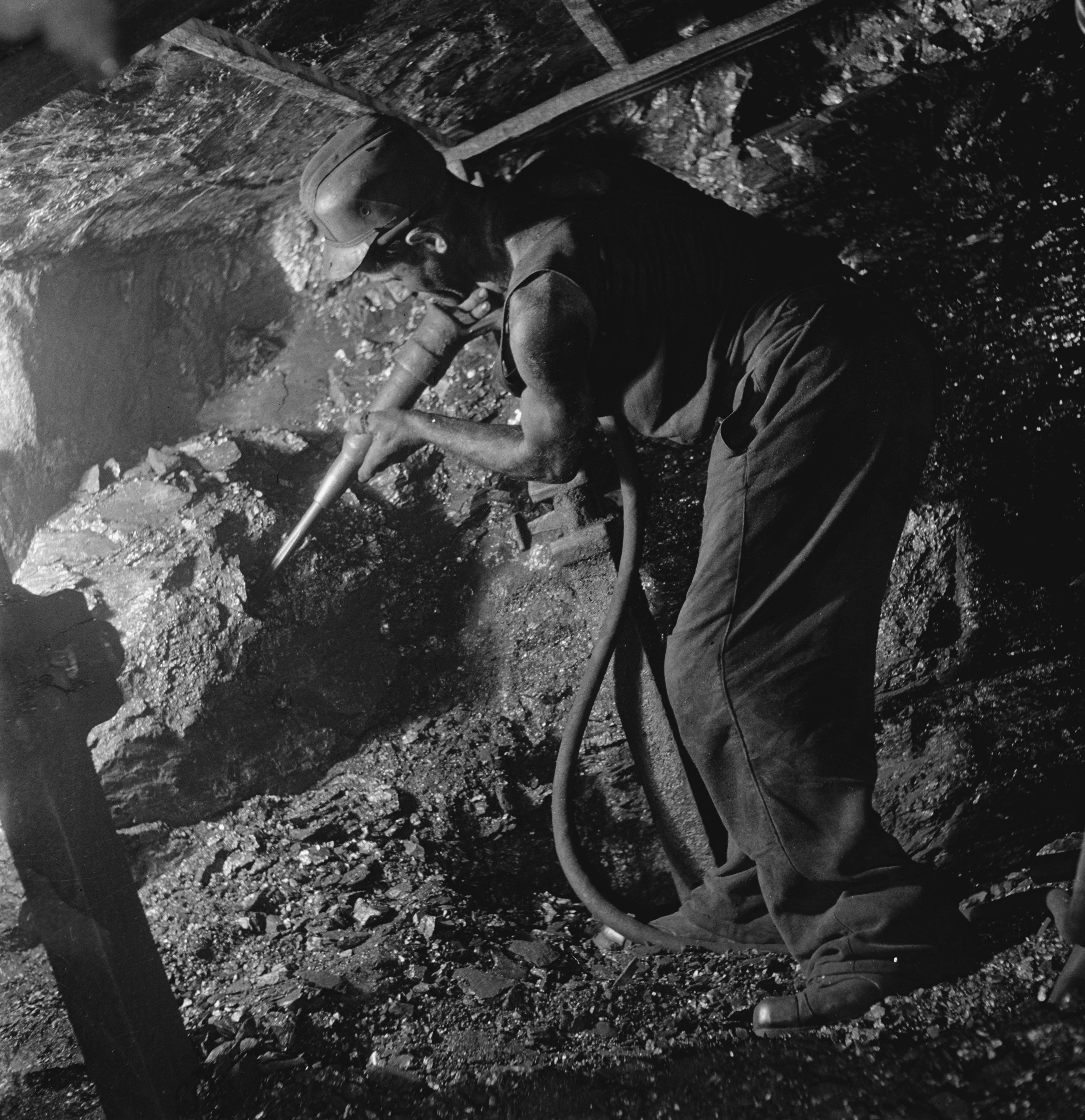 Collectie / Archief : Fotocollectie Anefo Reportage / Serie : Kolenmijnen Limburg Beschrijving : Kolenmijnen Limburg Datum : 21 november 1945 Locatie : Limburg Trefwoorden : mijnbouw, mijnen, mijnwerkers Fotograaf : Taconis, Kryn / Anefo Auteursrechthebbende : Nationaal Archief Materiaalsoort : Negatief (zwart/wit) Nummer archiefinventaris : bekijk toegang 2.24.01.03 Bestanddeelnummer : 901-1068